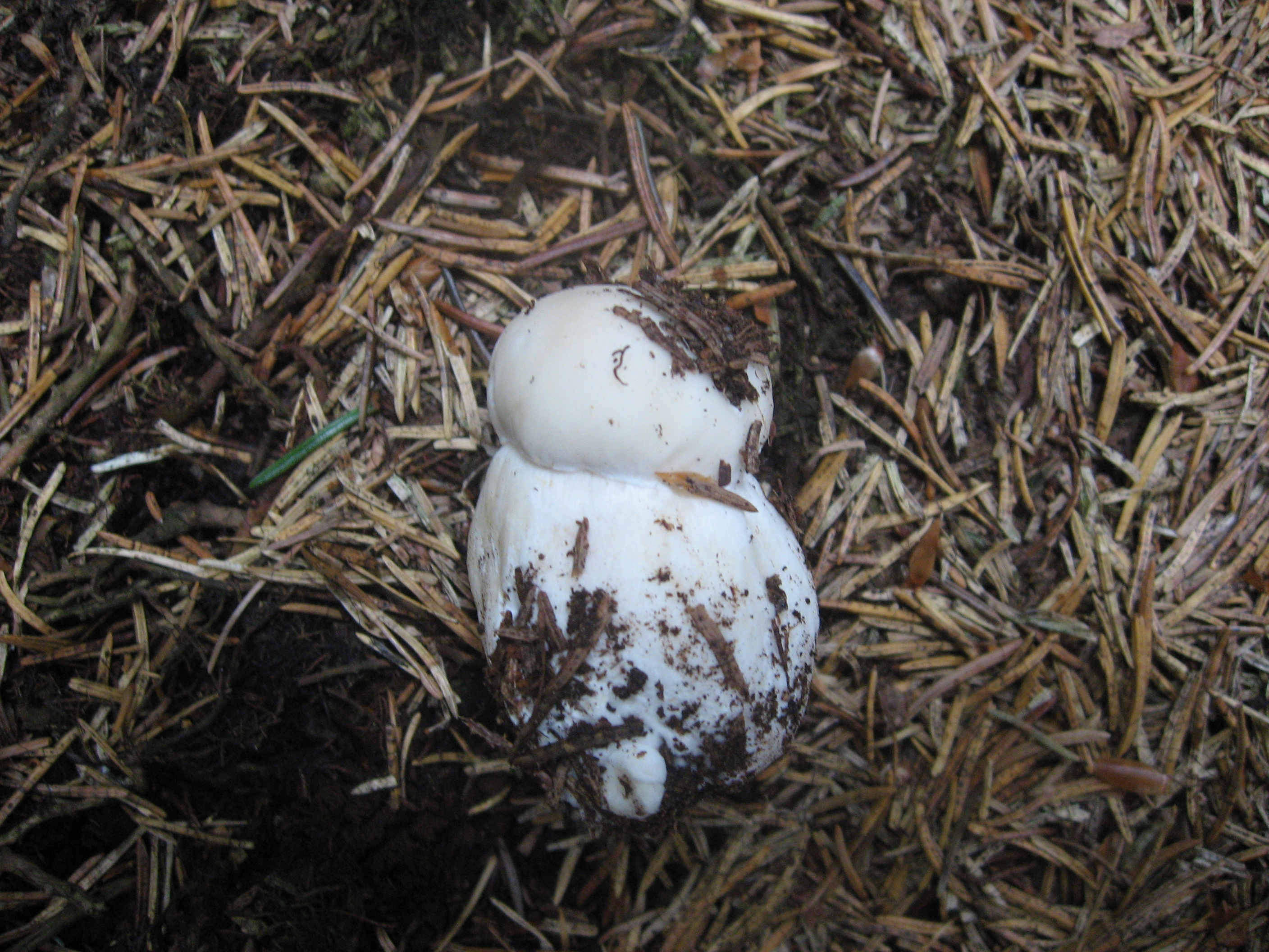 Hřib smrkový